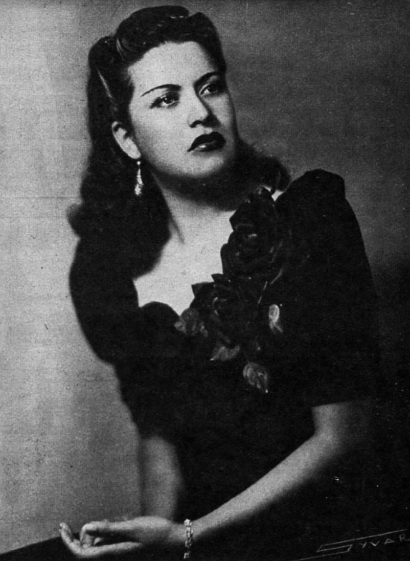 Ester Soré, seudónimo de Marta Yupanqui Donoso (Santiago, 27 de mayo de 1915 - ibíd., 6 de septiembre de 1996), fue una cantante de bolero y folclore y actriz chilena, considerada una de las principales entretenedoras de mediados del siglo XX en su país. Fue nombrada como «figura fundamental de la música chilena» por la Sociedad Chilena del Derecho de Autor (SCD) en 1993